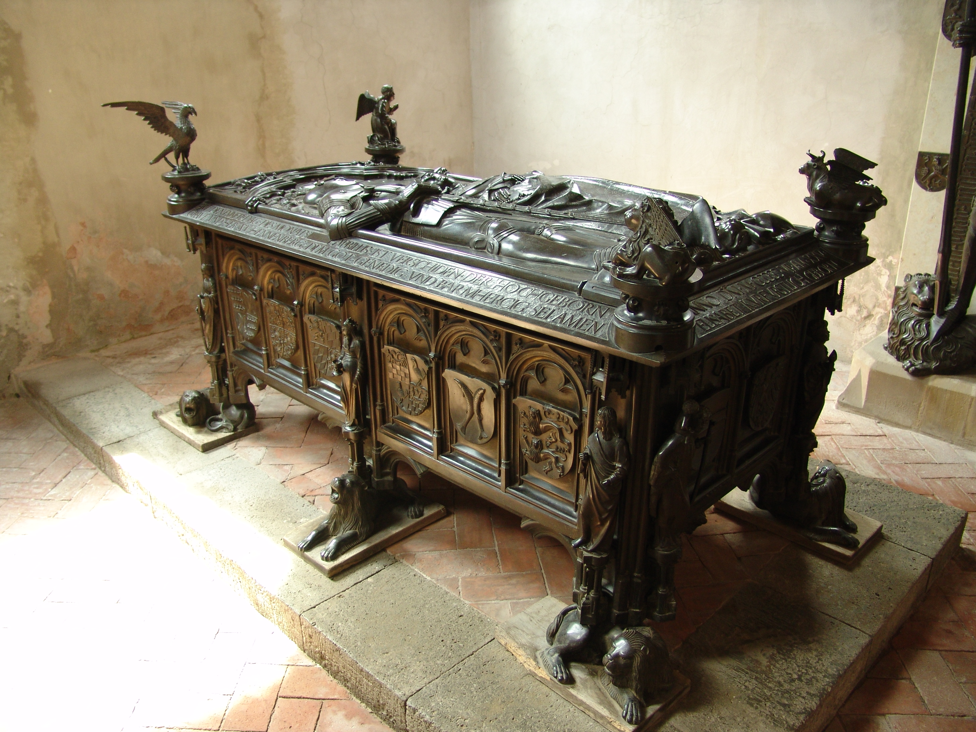 Römhild - Stiftskirche Grabmal Hermann VII. von Henneberg